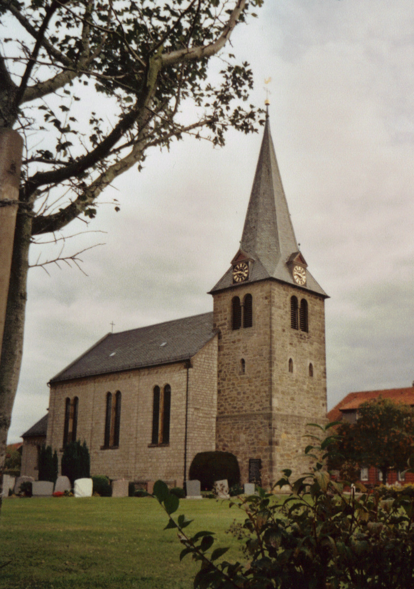 Marienkirche in Hildesheim-Einum